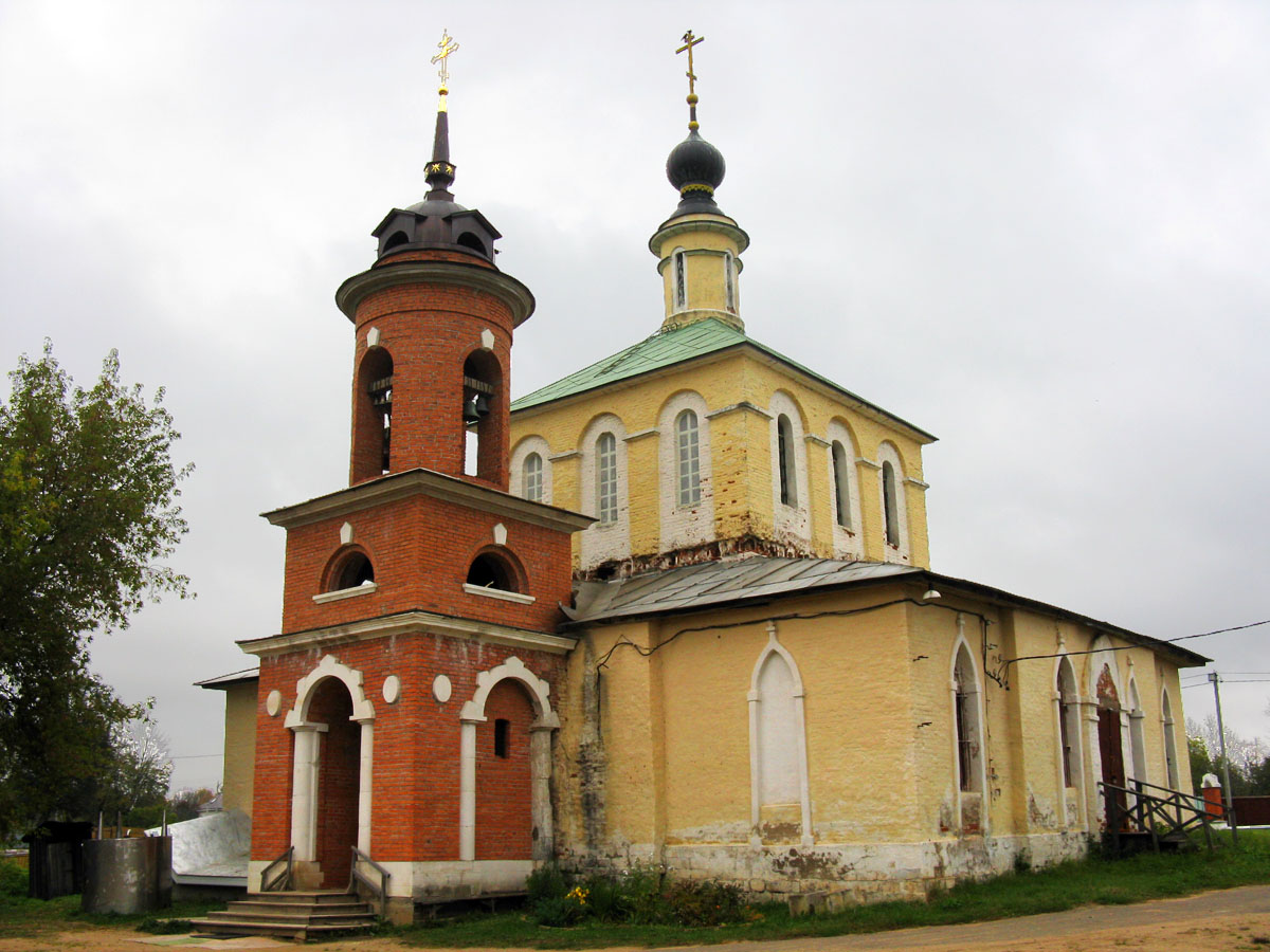 Храм Рождества Пресвятой Богородицы в селе Колюбакино (Рузский район Московской области), построена в середине XVIII века, перестроена в 1833-35 гг.